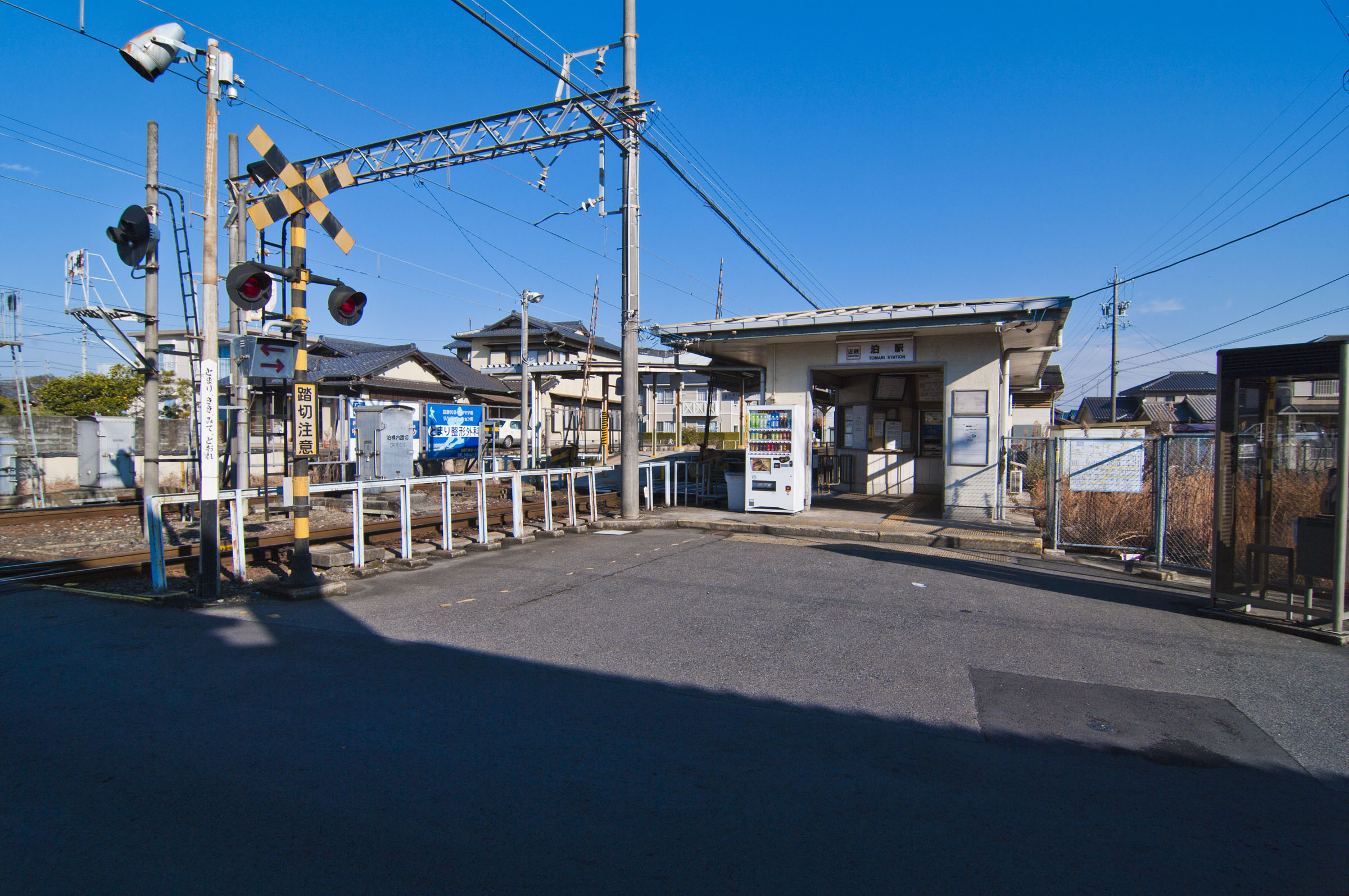 近畿日本鉄道株式会社内部線泊駅